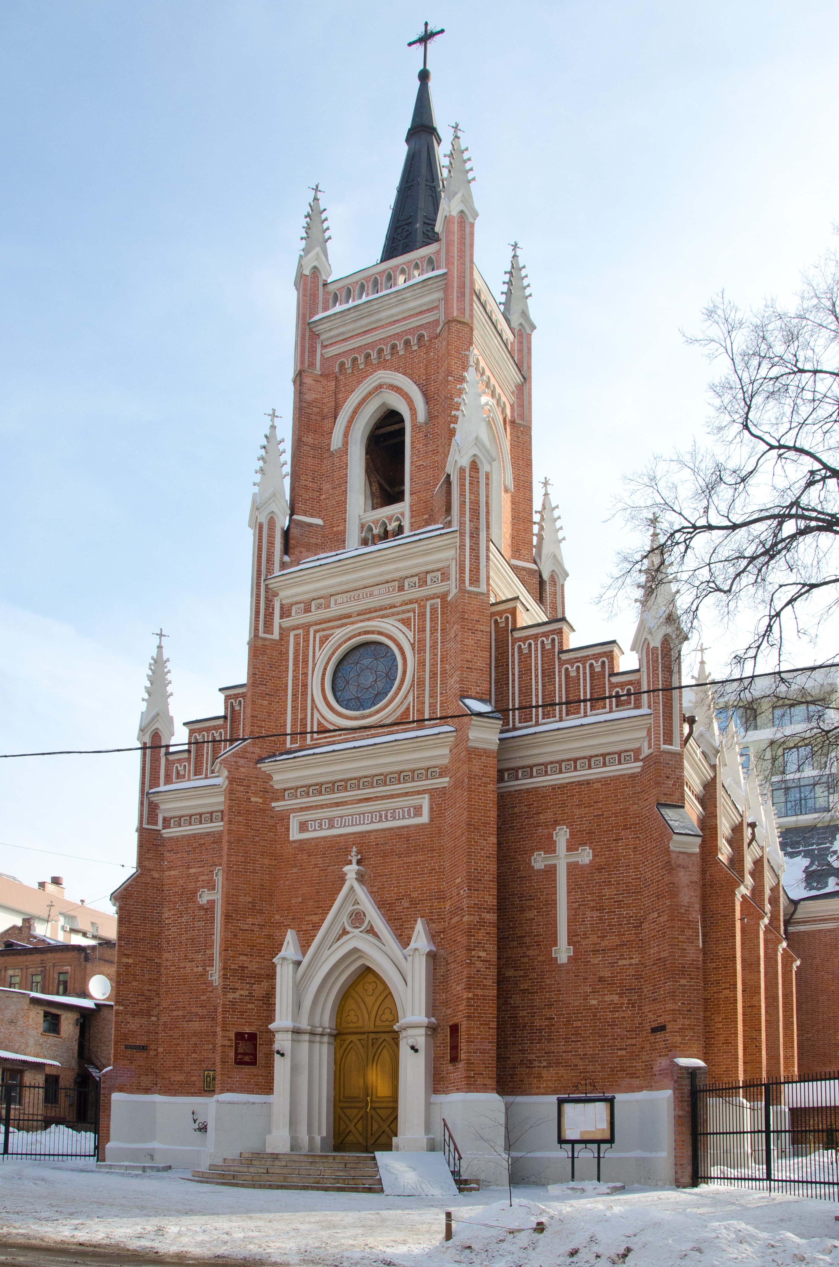 Костел, Харків, вул. Гоголя, 4